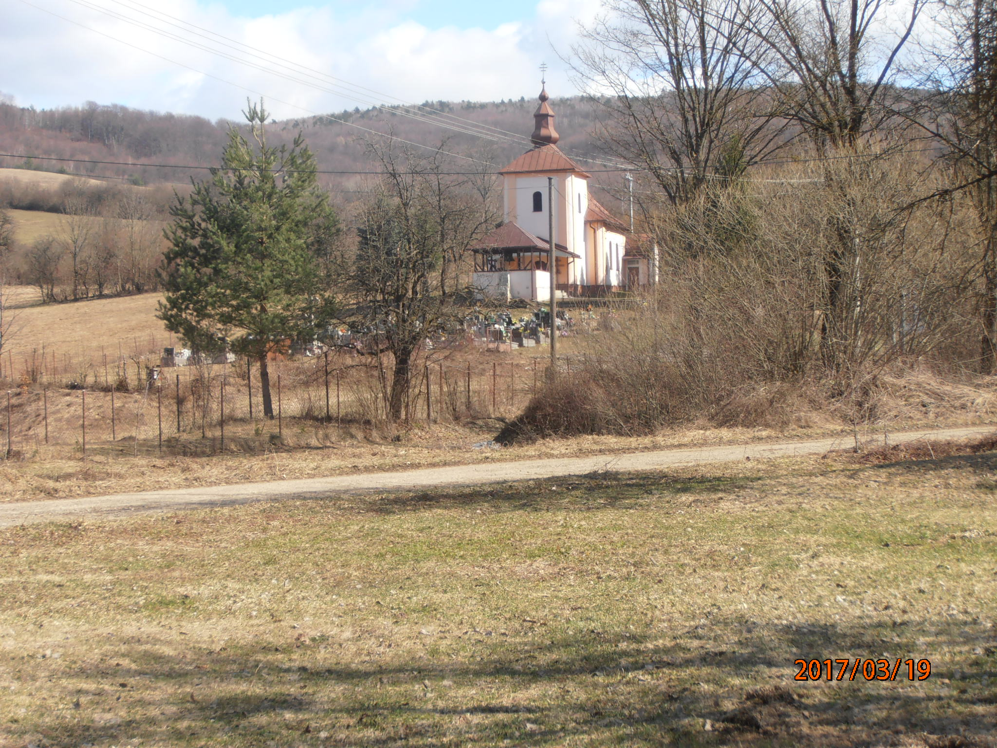 Gréckokatolícka cerkva v obci pochádza z roku 1788